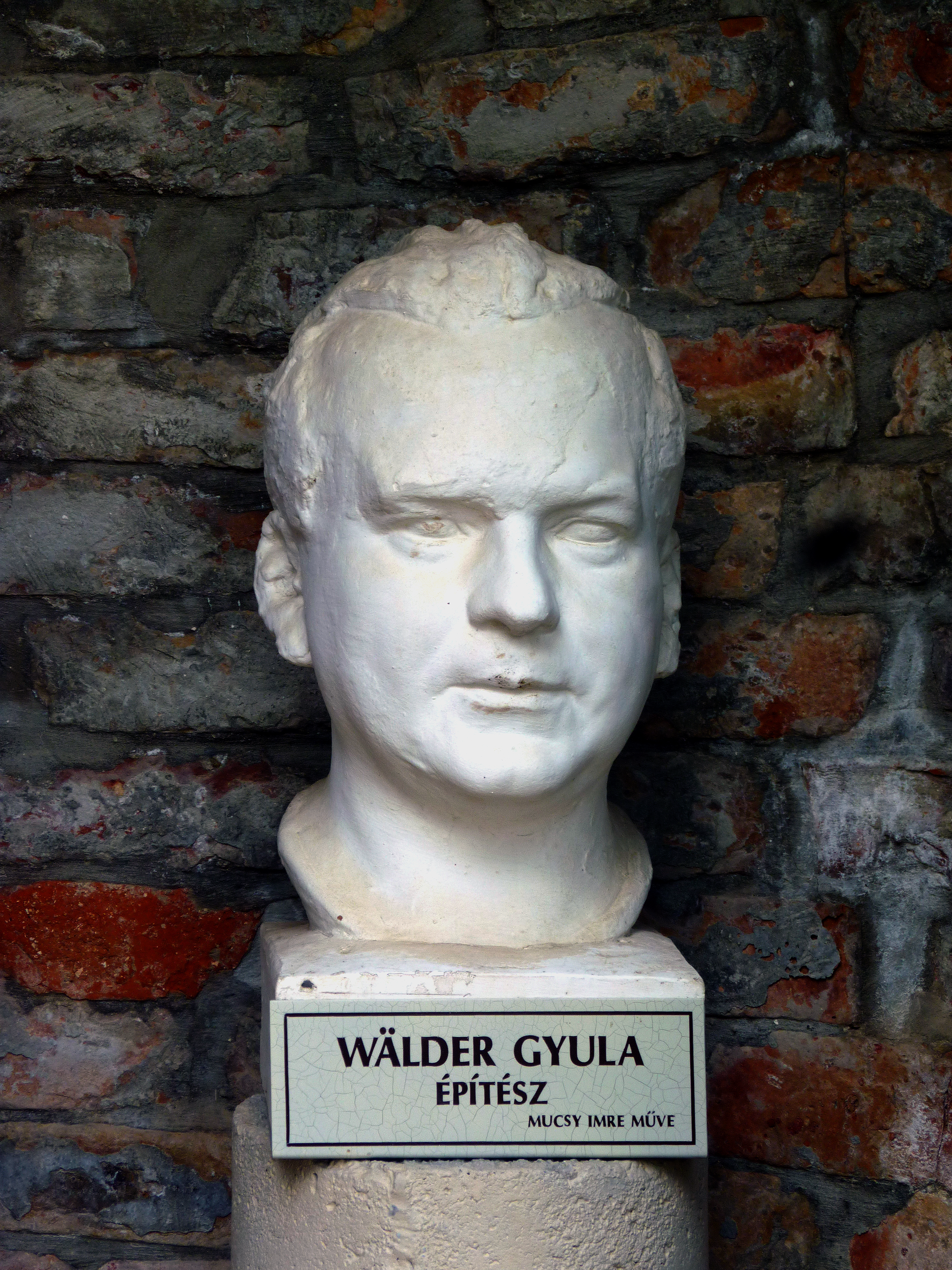 Mucsy Imre: Wälder Gyula építész mellszobra (Bory-vár, Székesfehérvár)